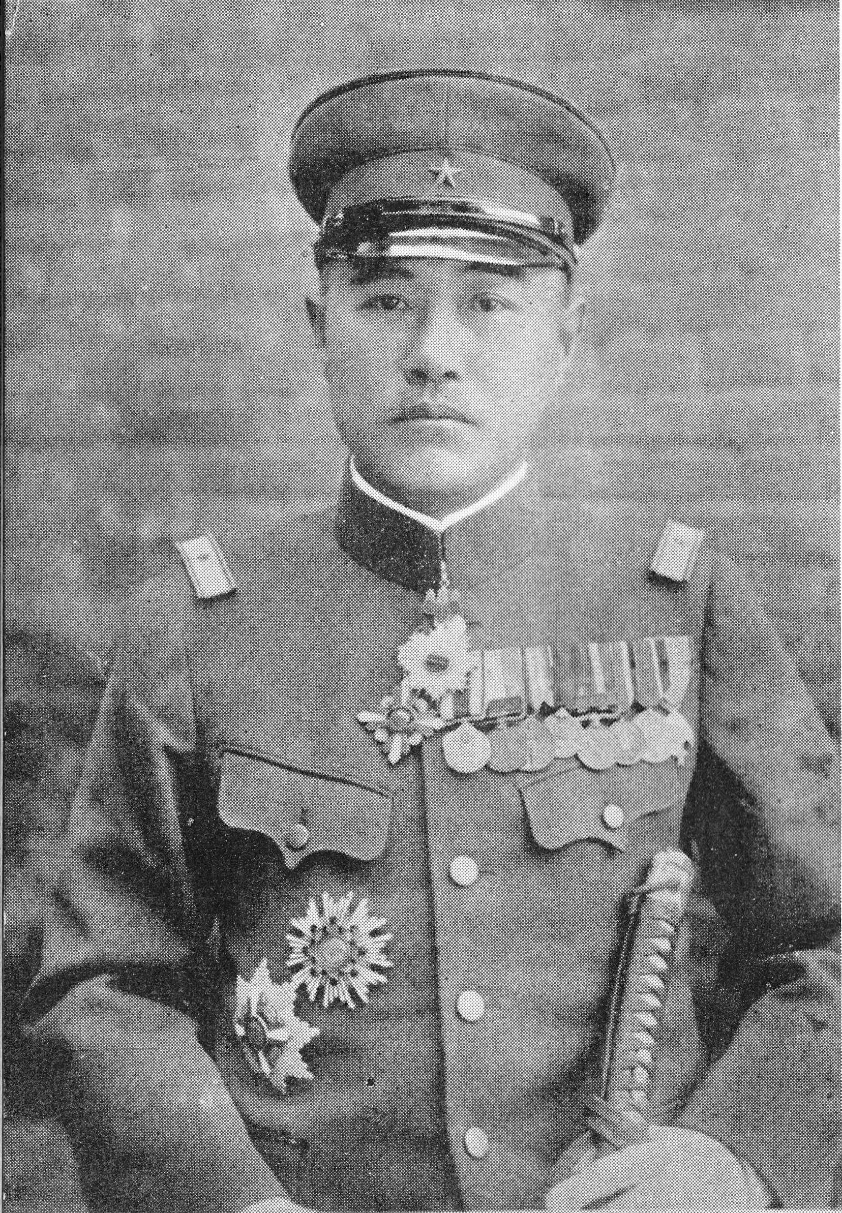 少将時代の佐々木到一